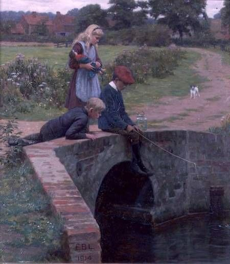 A nibble.